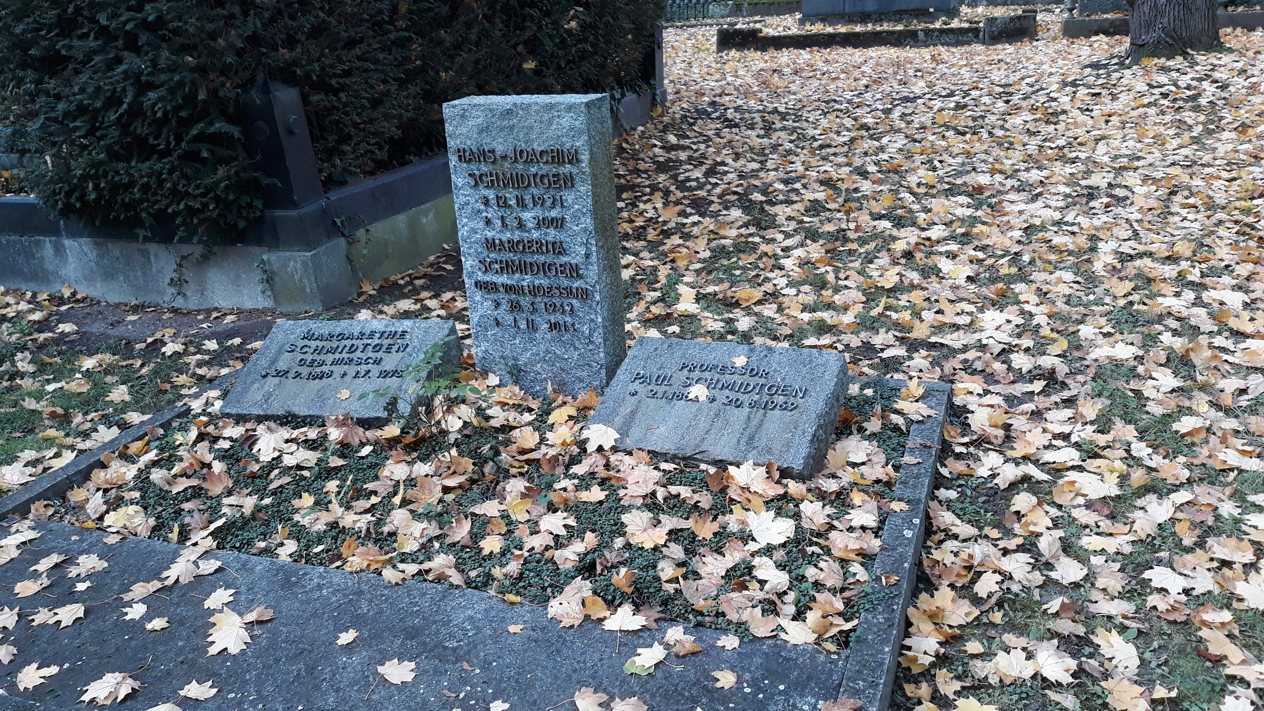 Das Grab des deutschen Apothekers und Chemikers Paul Schmidtgen im Familiengrab auf dem Pragfriedhof Stuttgart.